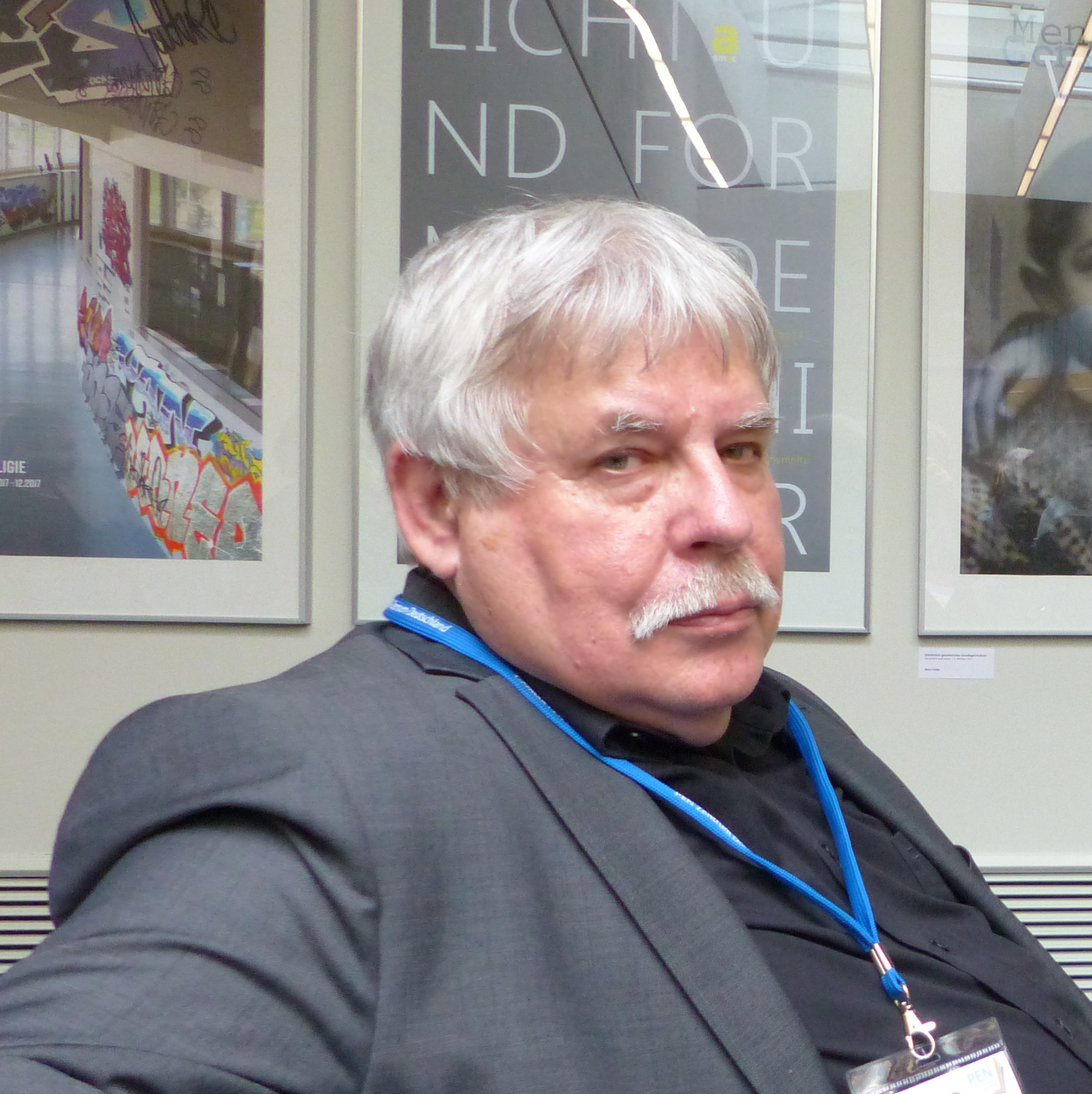 Jürgen Engler (Kulturwissenschaftler), Chemnitz 2019